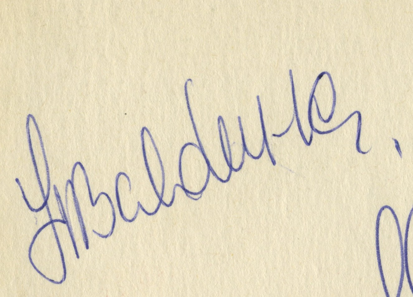 Автограф советского хоккеиста Хельмута Балдериса из клуба Динамо Рига на латышском.